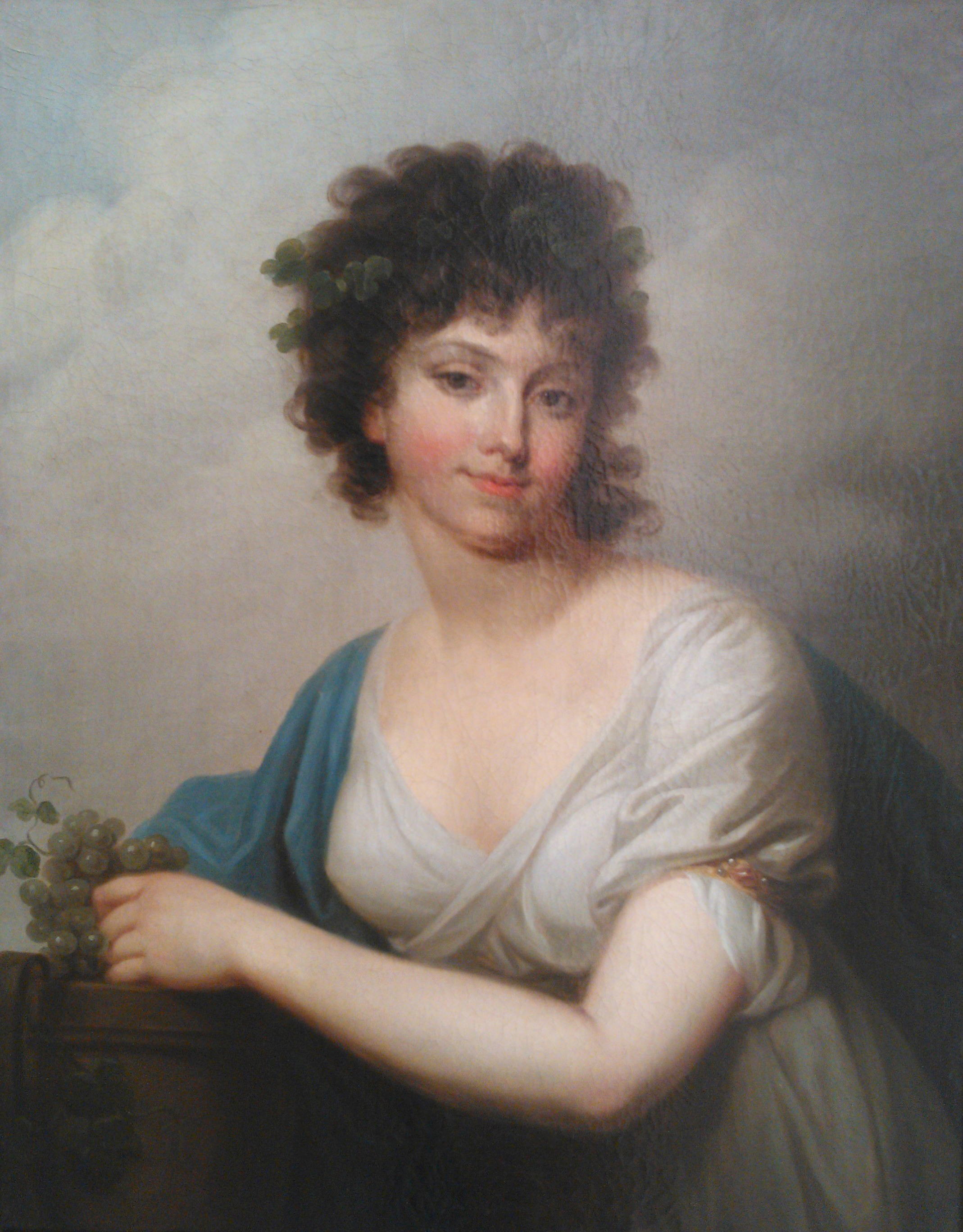 Izabela z Grabowskich Sobolewska